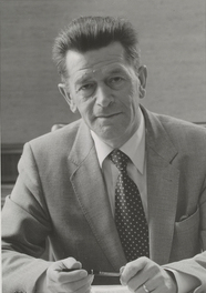 Burgemeester drs. A.L. Heldens. A.L. Heldens, burgemeester van de gemeente Gemert van 17 november 1979 tot 1988.